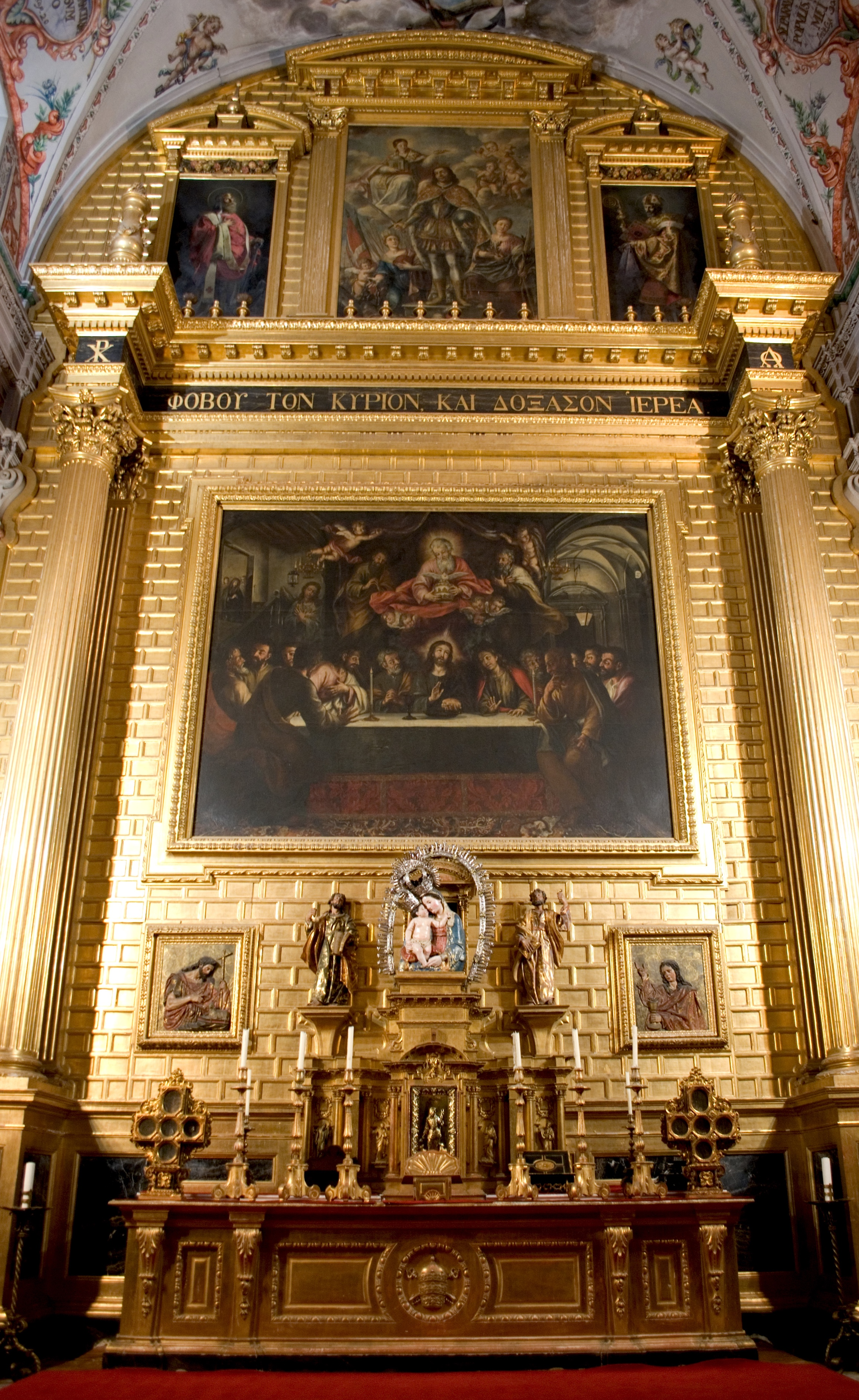 Retablo mayor de la iglesia de los Venerables en Sevilla